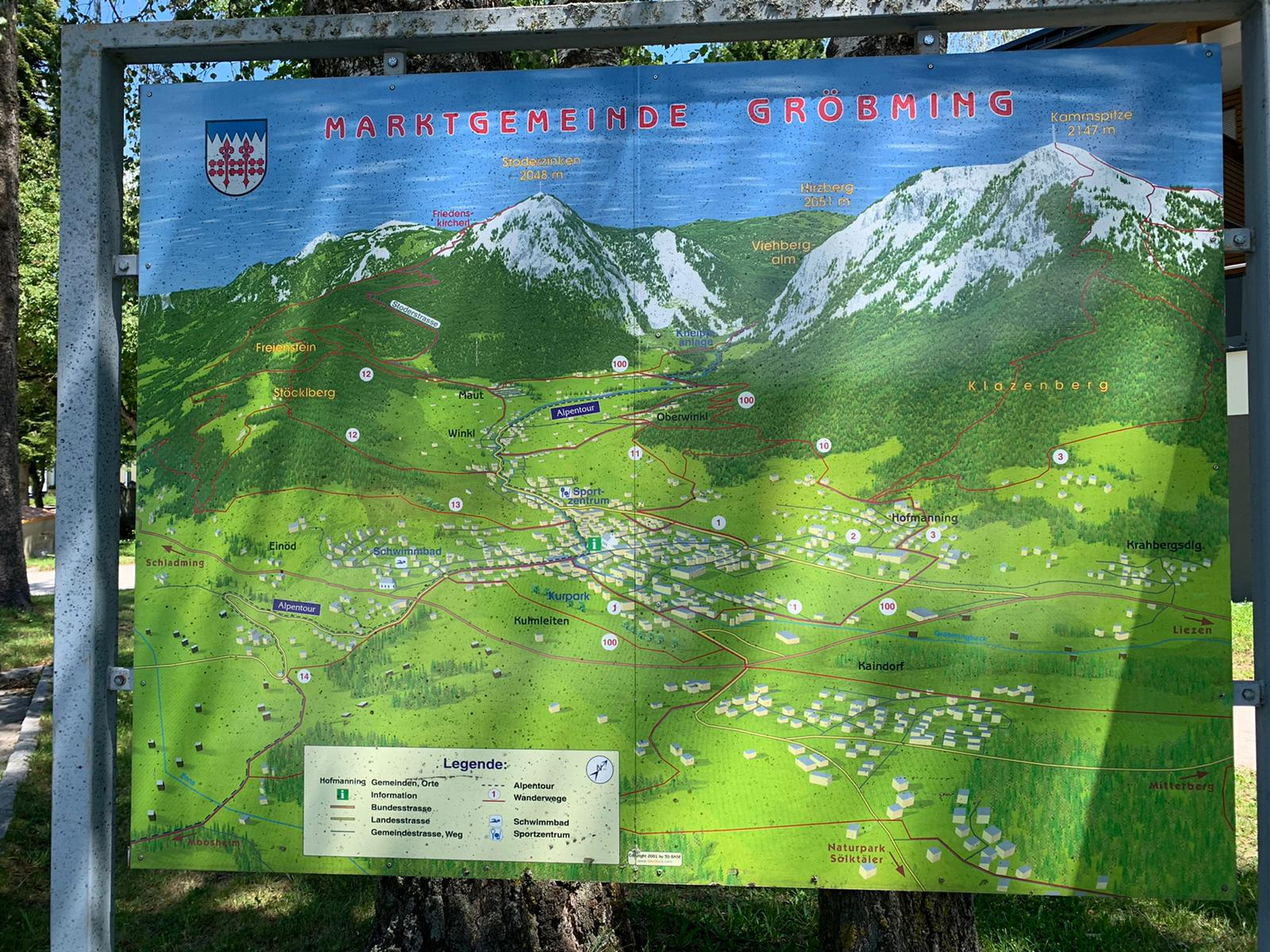 Eine nicht mehr aktuelle und alte Gemeindekarte im Gröbminger Kurpark.